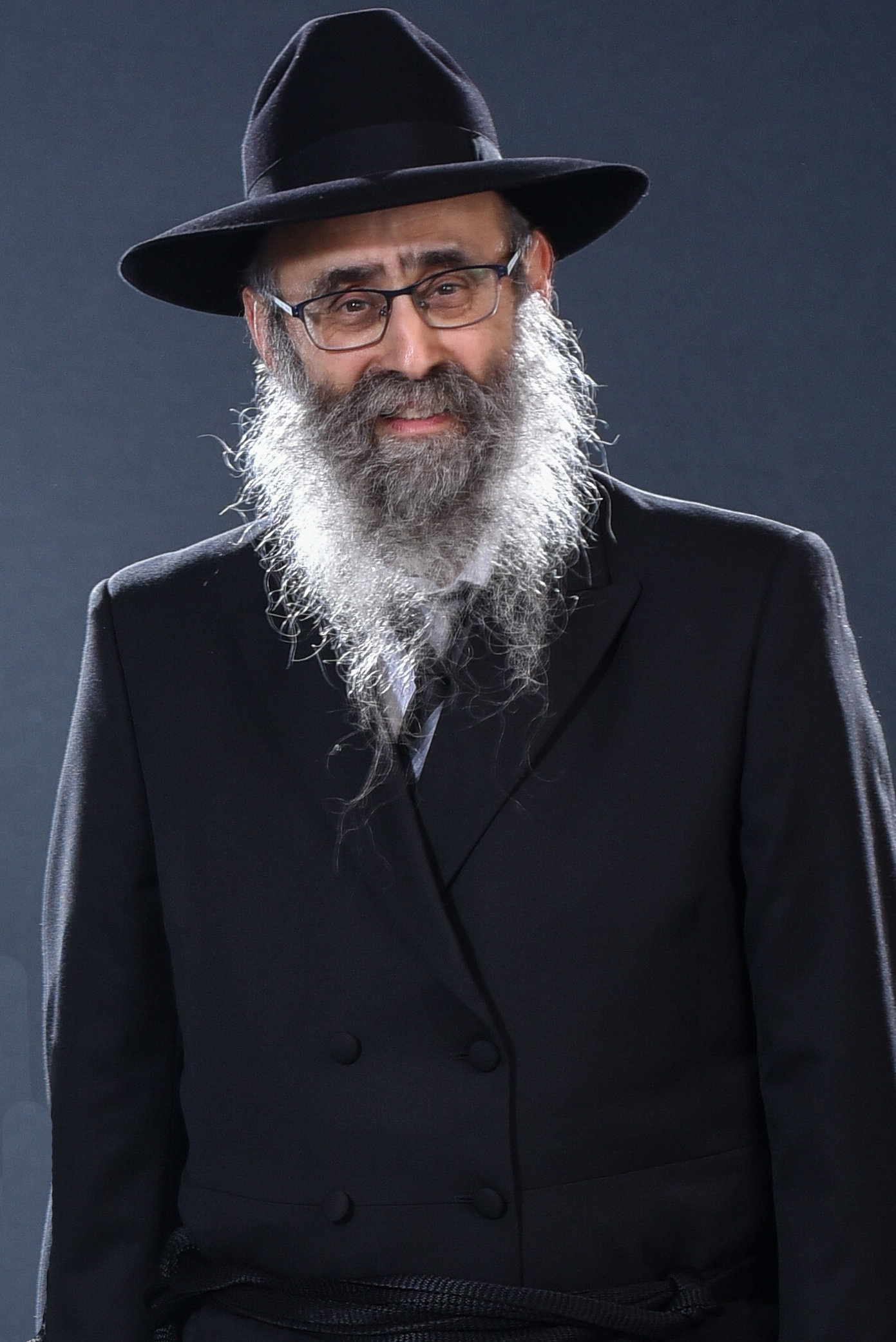 הרב מנחם מענדל גלוכובסקי.